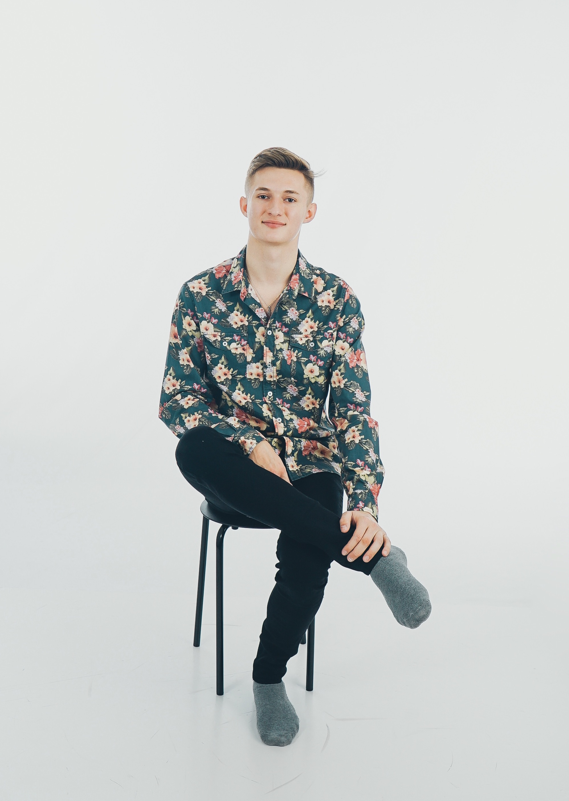 Hynek Hradecký, 2018